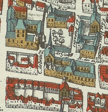 Rue de Braque